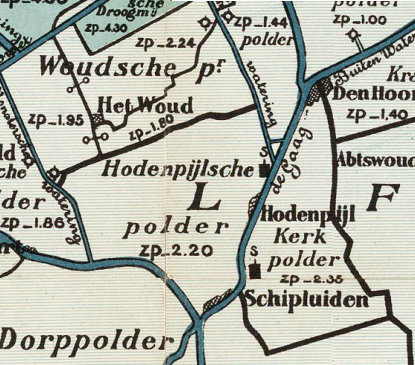 Hodenpijlsche_polder